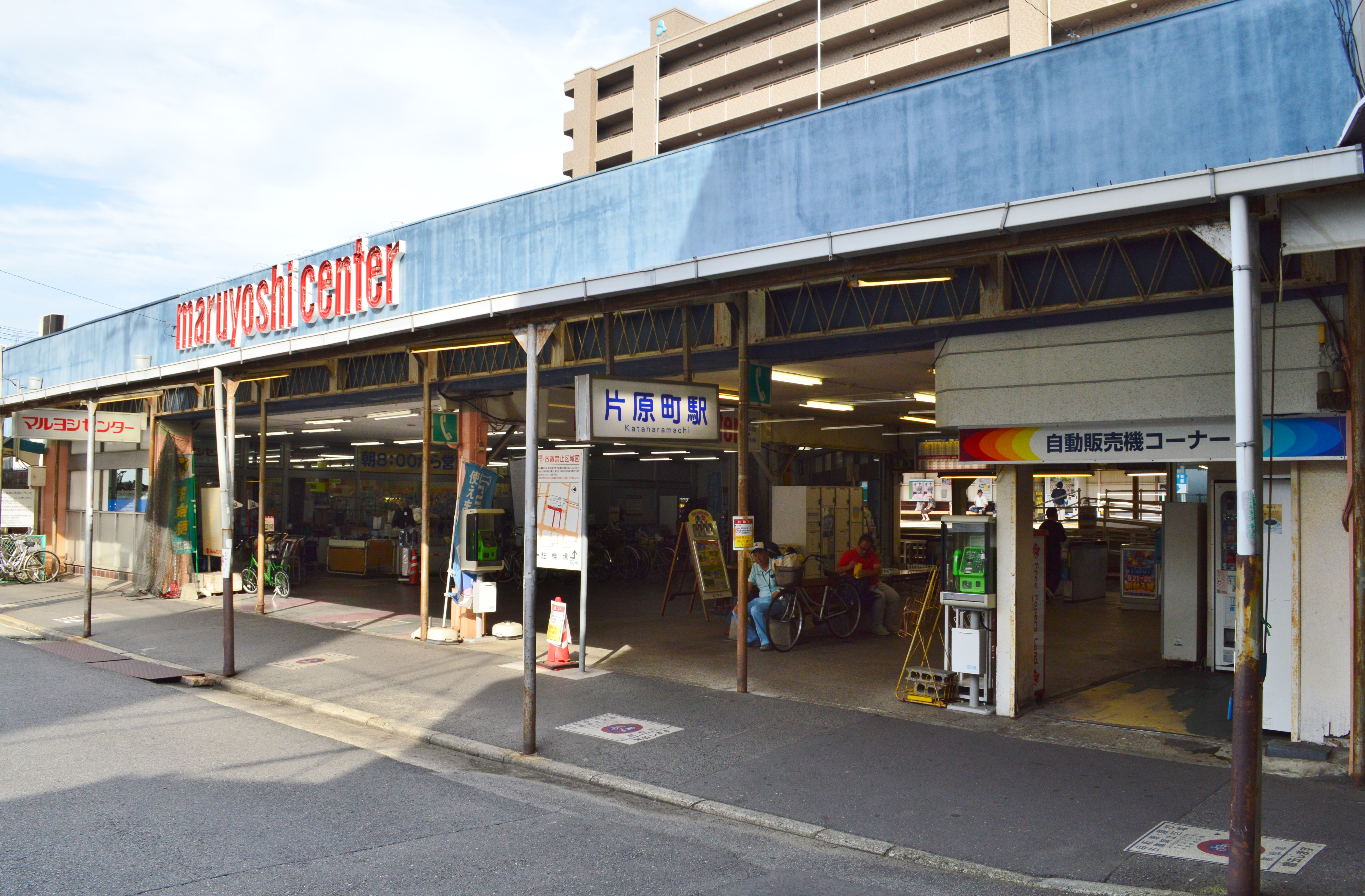 片原町駅 入り口